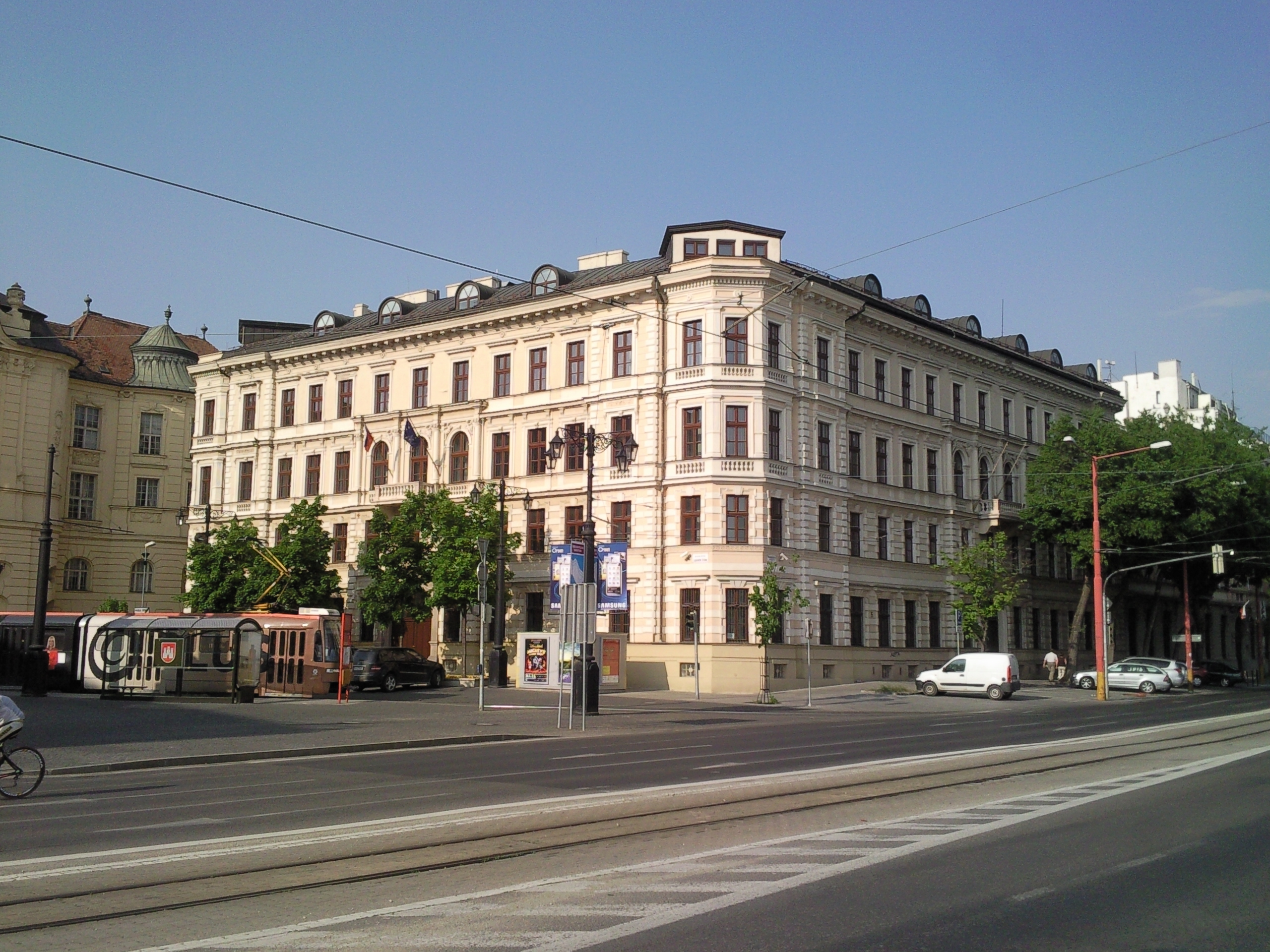 Lanfranconiho palác, Námestie Ľudovíta Štúra, Bratislava